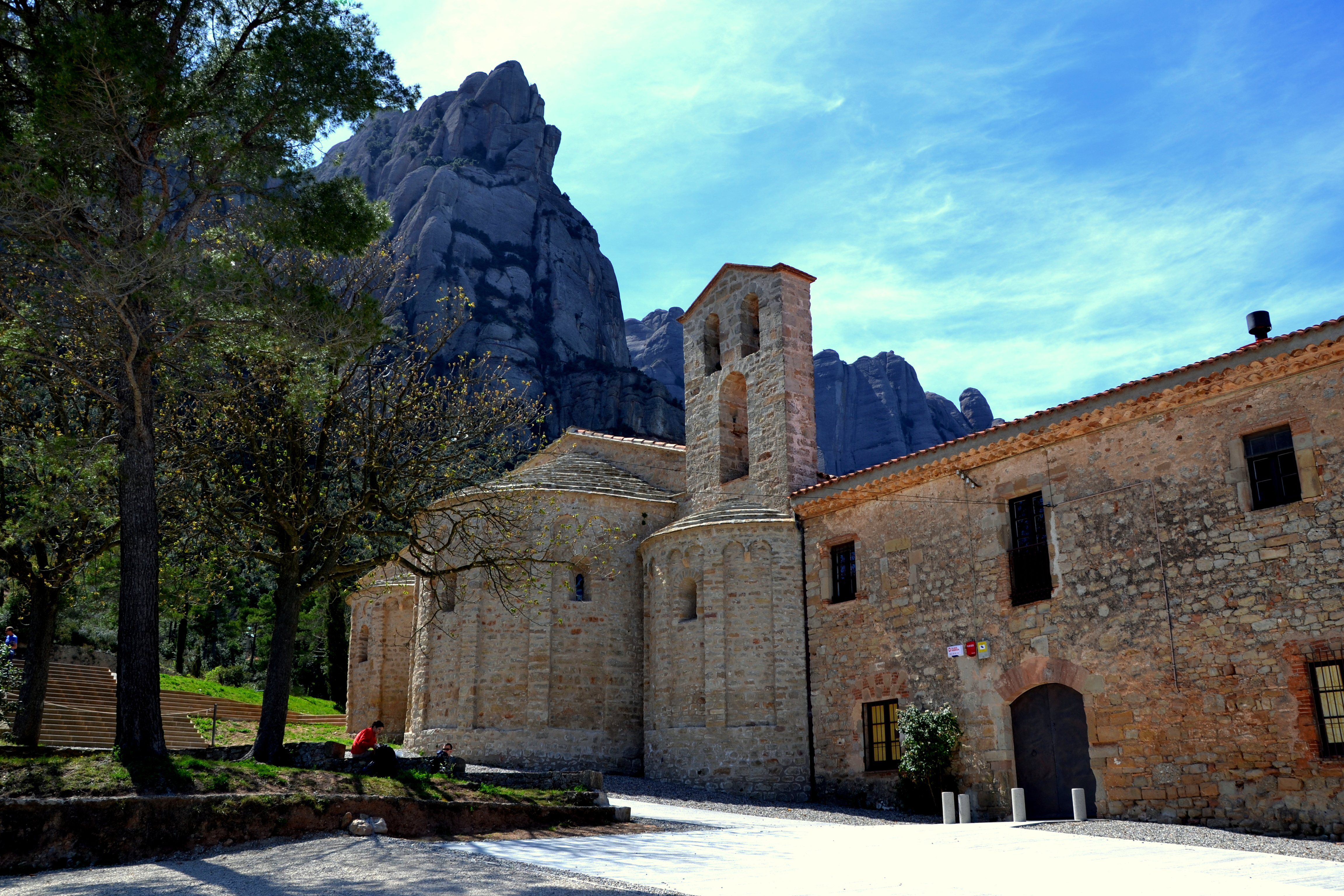 Fou erigida vers el 945 per l'abat Cesari, que entre el 966 i el 981 pretengué ser l'arquebisbe de la Tarraconense. El 951, Cesari va obtenir un precepte del rei Lluís IV de França, que li confirmava la dotació inicial assignada pels comtes Sunyer I i la seva esposa Riquilda, els seus protectors. El 956 fou sotmesa canònicament al bisbat de Vic. El 1023 va estar a punt de ser sotmès pel monestir de Ripoll, que fundà tot seguit el veí priorat de Santa Maria de Montserrat. Fou cedida al monestir de Sant Cugat el 1058, per separar-se'n 50 anys més tard. El 1143, la parròquia de Marganell fou donada al monestir pel bisbe de Vic. Al segle XIV entrà en decadència, i aviat es convertí en un lloc d'hostalatge per als pelegrins de Santa Maria de Montserrat, entrant en la seva òrbita el 1410, i annexat el 1539. Els abats de Santa Maria tingueren cura des d'aleshores de la casa, on hi residia només un prevere i els seus servents. En va sortir malmesa pel pas dels francesos del 1811-1812, fou reparada per l'abat Muntadas entre el 1862-1866, i definitivament restaurada per Puig i Cadafalch el 1928.